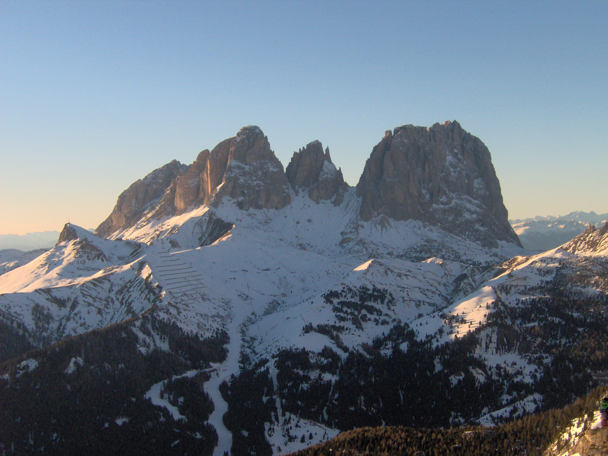 Dolomiti - Sasslong visto dal Passo Pordoi